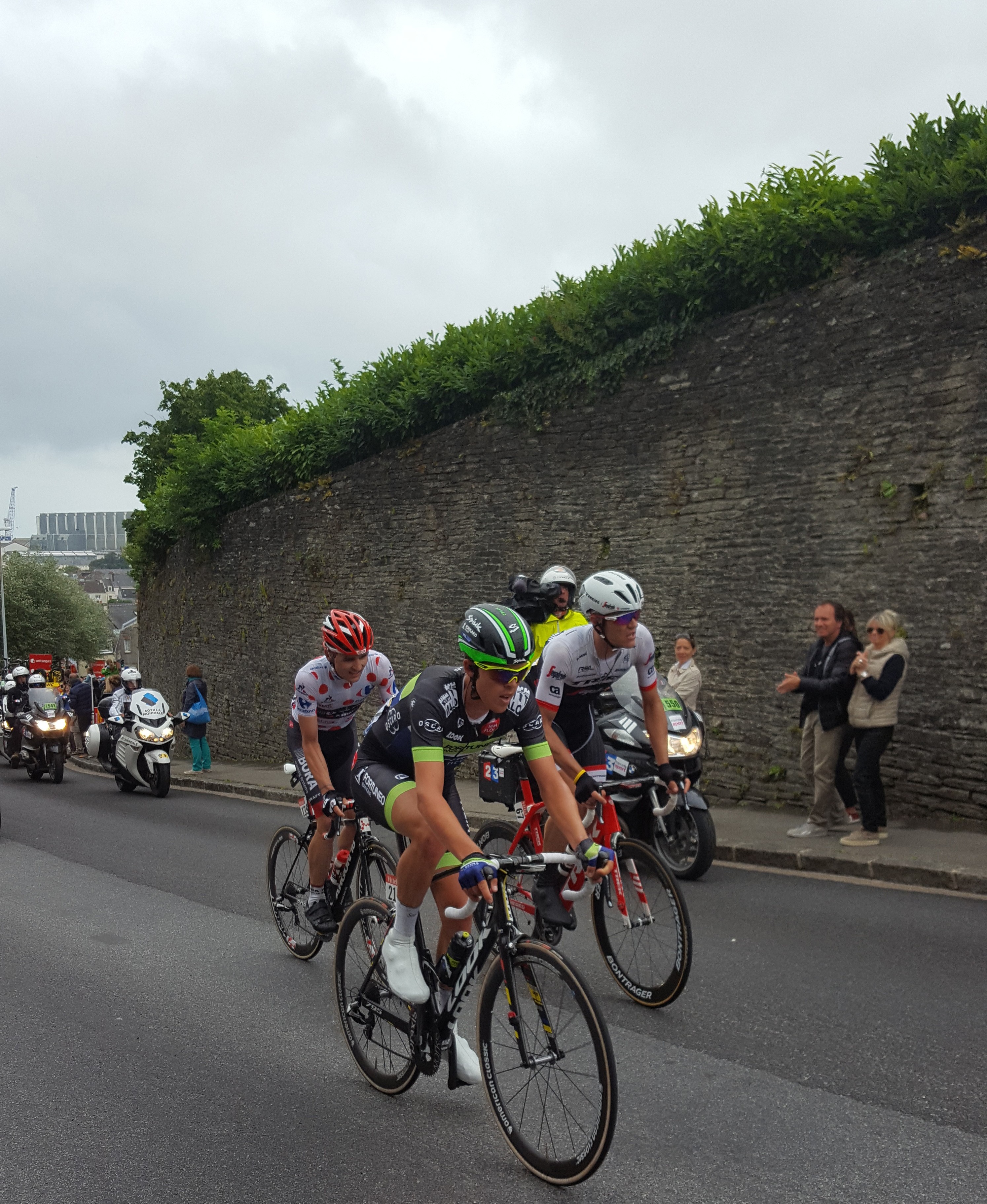 Passage de l'échappée dans la côte d'Octeville (chemin des Aiguillons) durant la 2e étape du Tour de France 2016. Vegard Breen mène la course devant Jasper Stuyven (qui attaquera 200 mètres plus loin), et le maillot à pois Paul Voss.